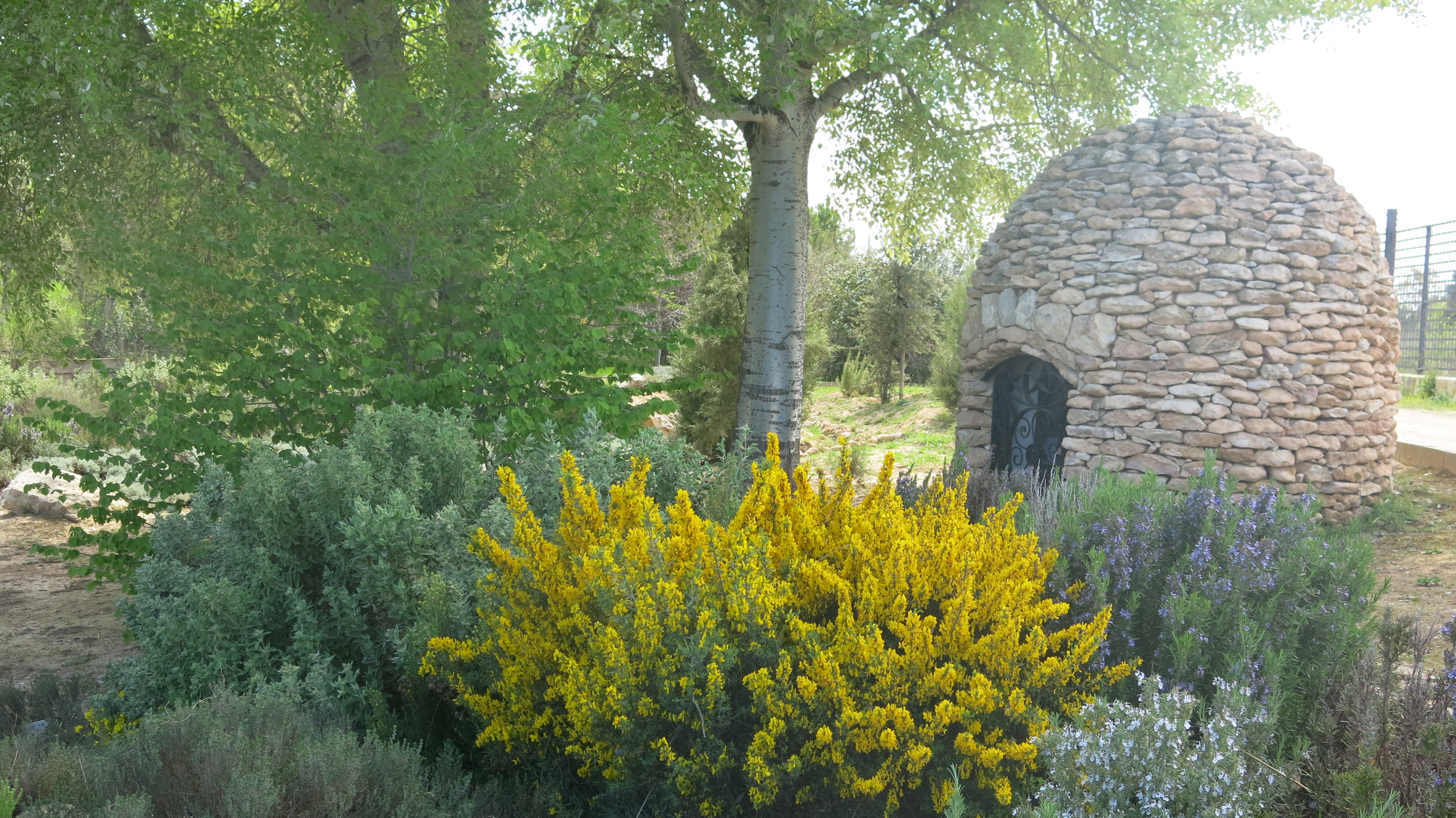 Horno de las terrazas de la recreación del Jardín Botánico de Castilla-La Mancha